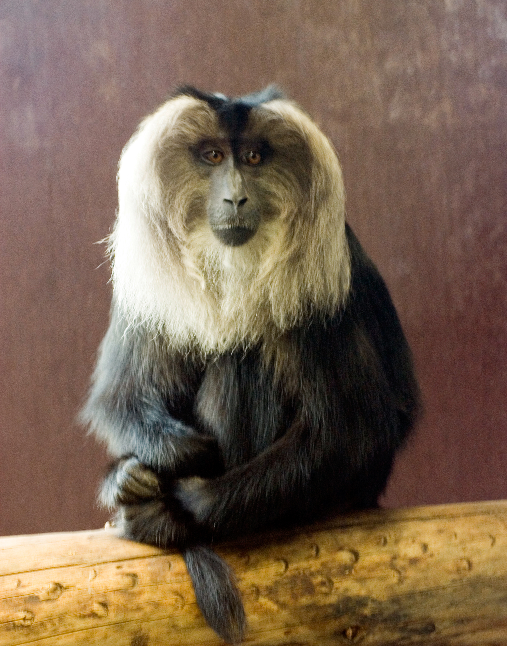 Lion-tailed macaque at Bristol Zoo